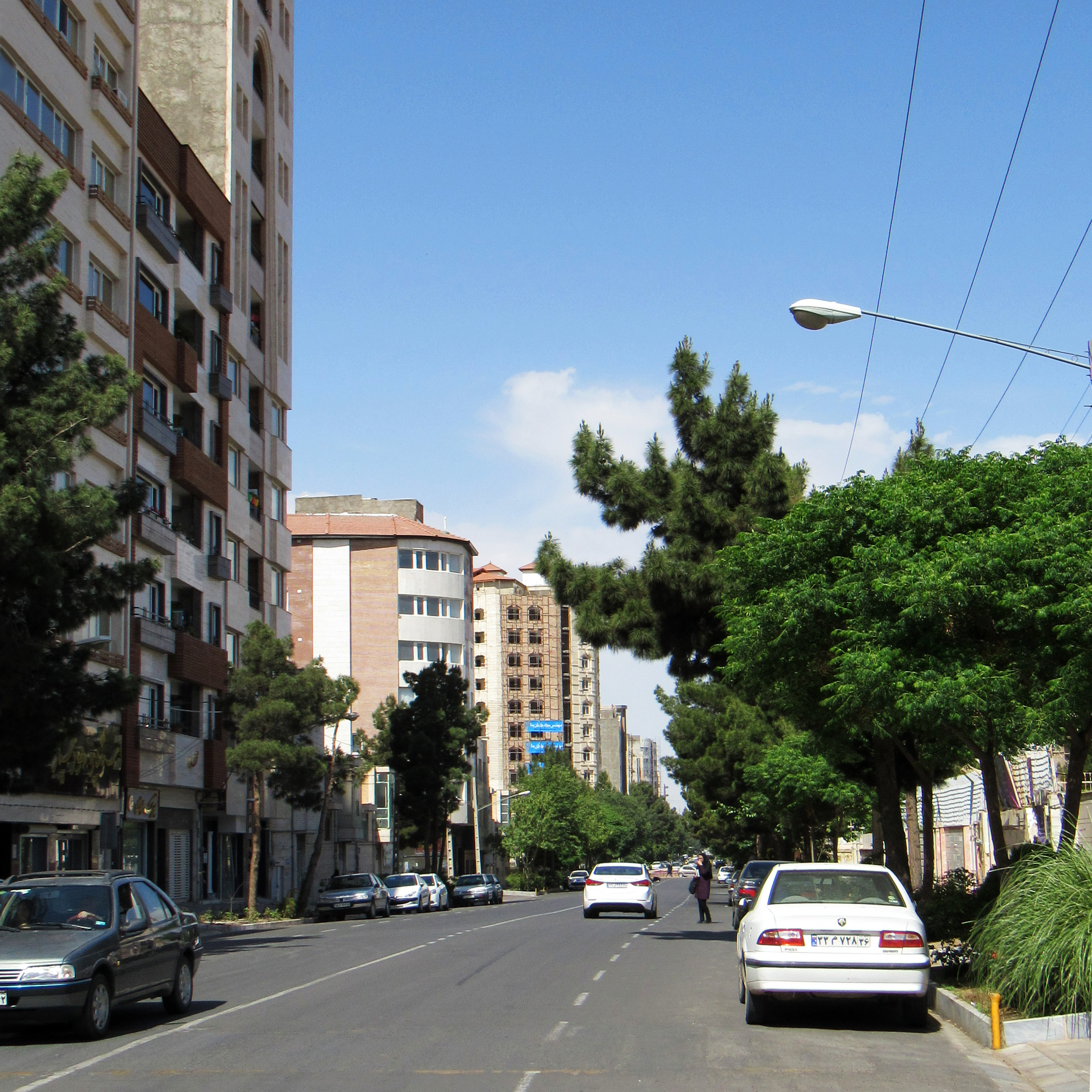 نمایی از عظیمیان سبزوار